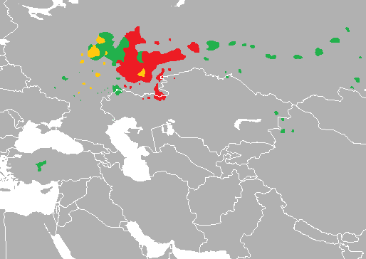 Lenguas Kypchak-Bolgar, de la rama de las lenguas túrquicas noroccidentales, de la familia altaica. Idioma tártaro Idioma bashkir Idioma chulim